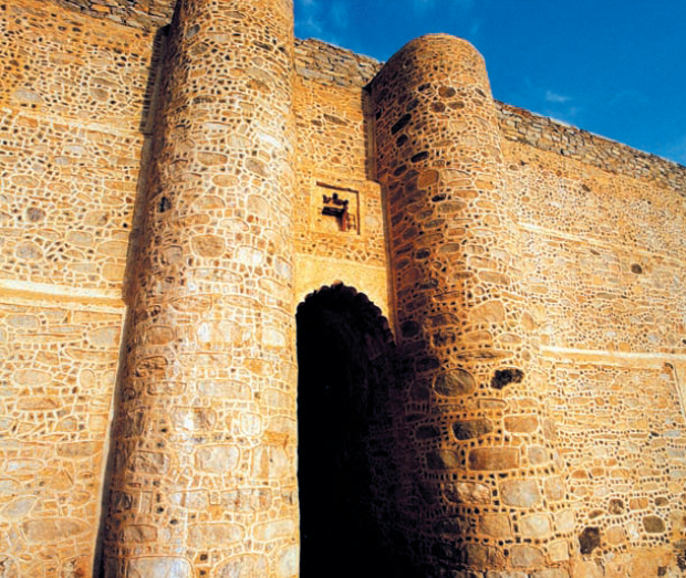 صورة لعين زبيدة